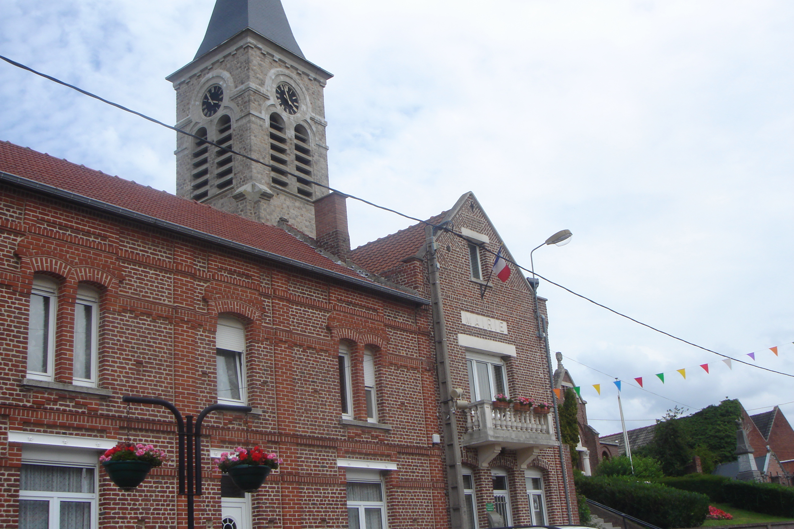 Mairie de Bugnicourt - Département du Nord - France